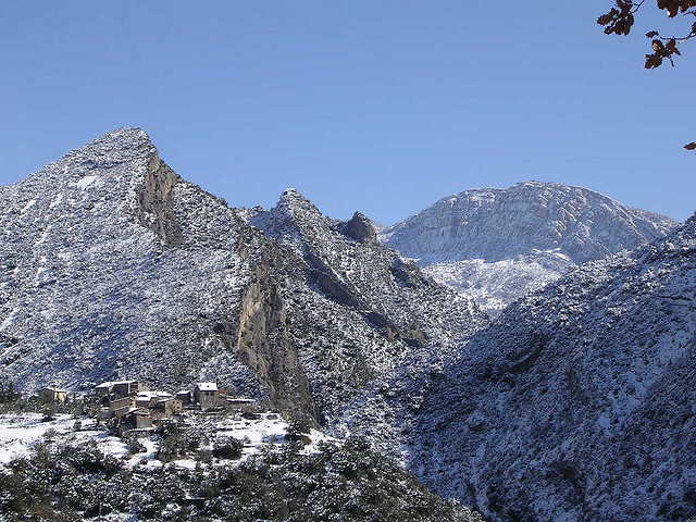 La Roca de la Pena al fons (2005)